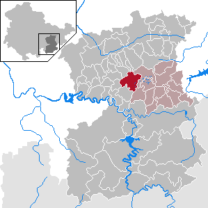 Knau in Thuringia - Saale-Orla-Kreis